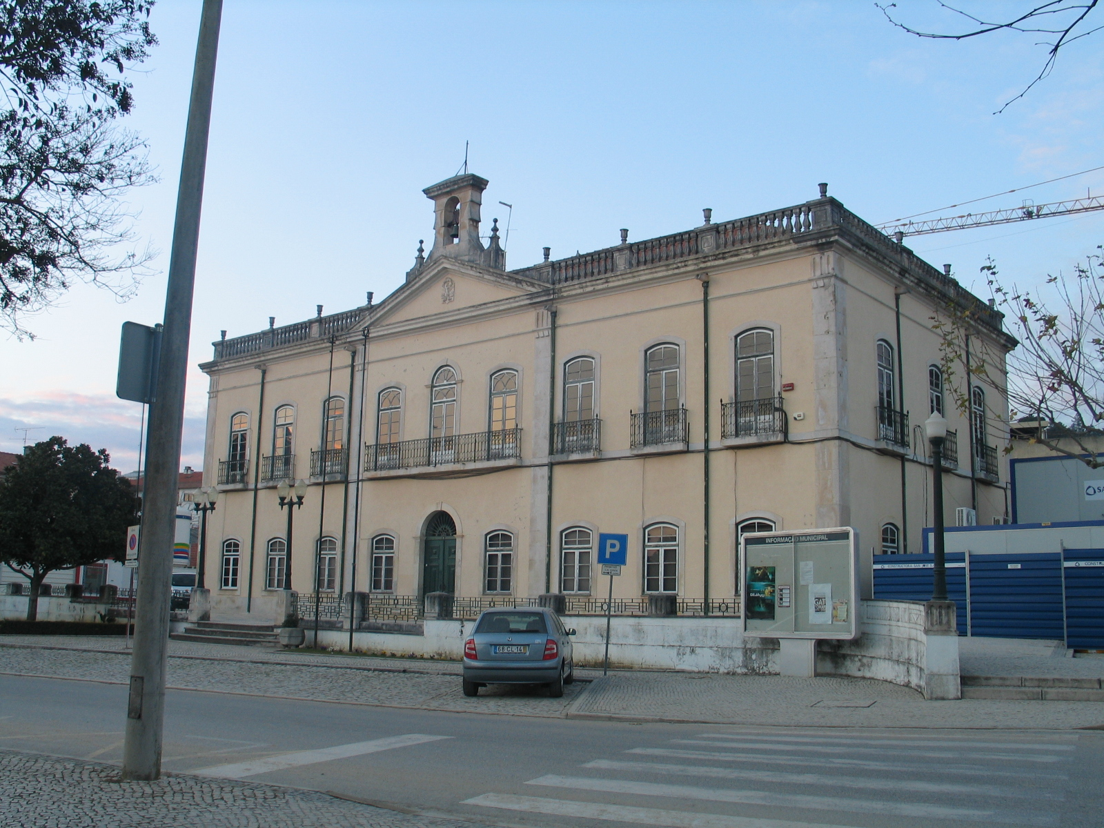 Ourém (Portugal) - Paços do Concelho /City Hall